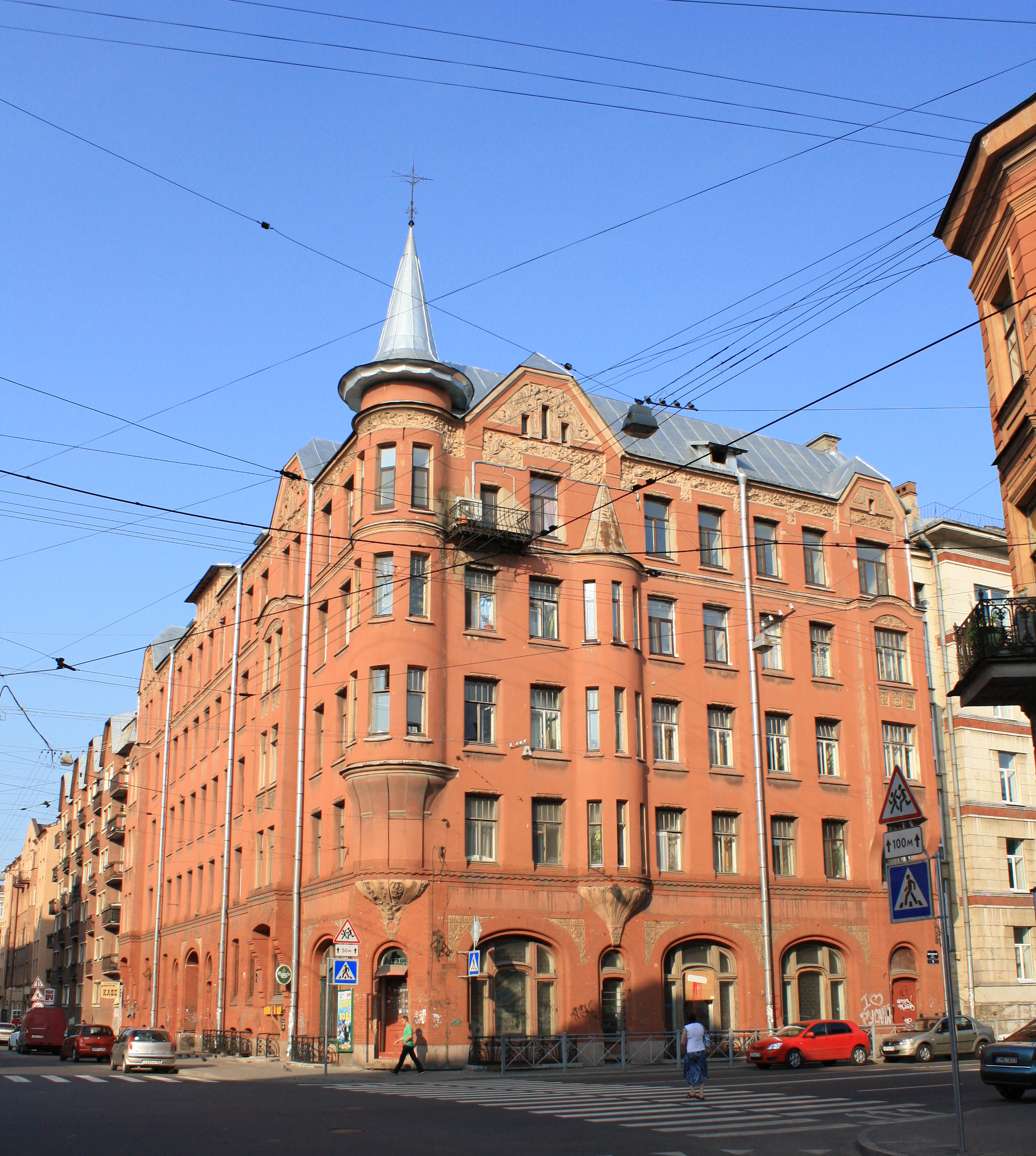 Санкт-Петербург. Херсонская ул., 13 / Перекупной пер., 12. Собственный доходный дом архитектора Карла Шмидта. 1901—1902